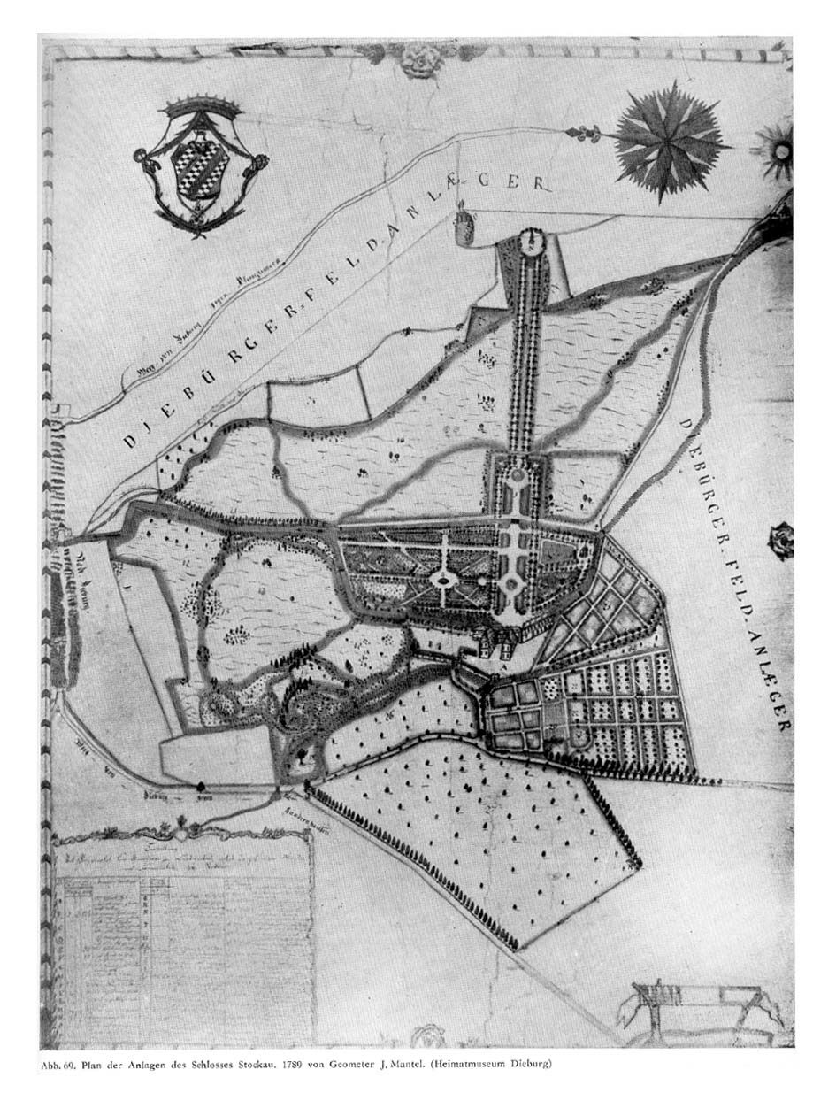 Plan der Anlage des Schlosses Stockau in Dieburg, 1789